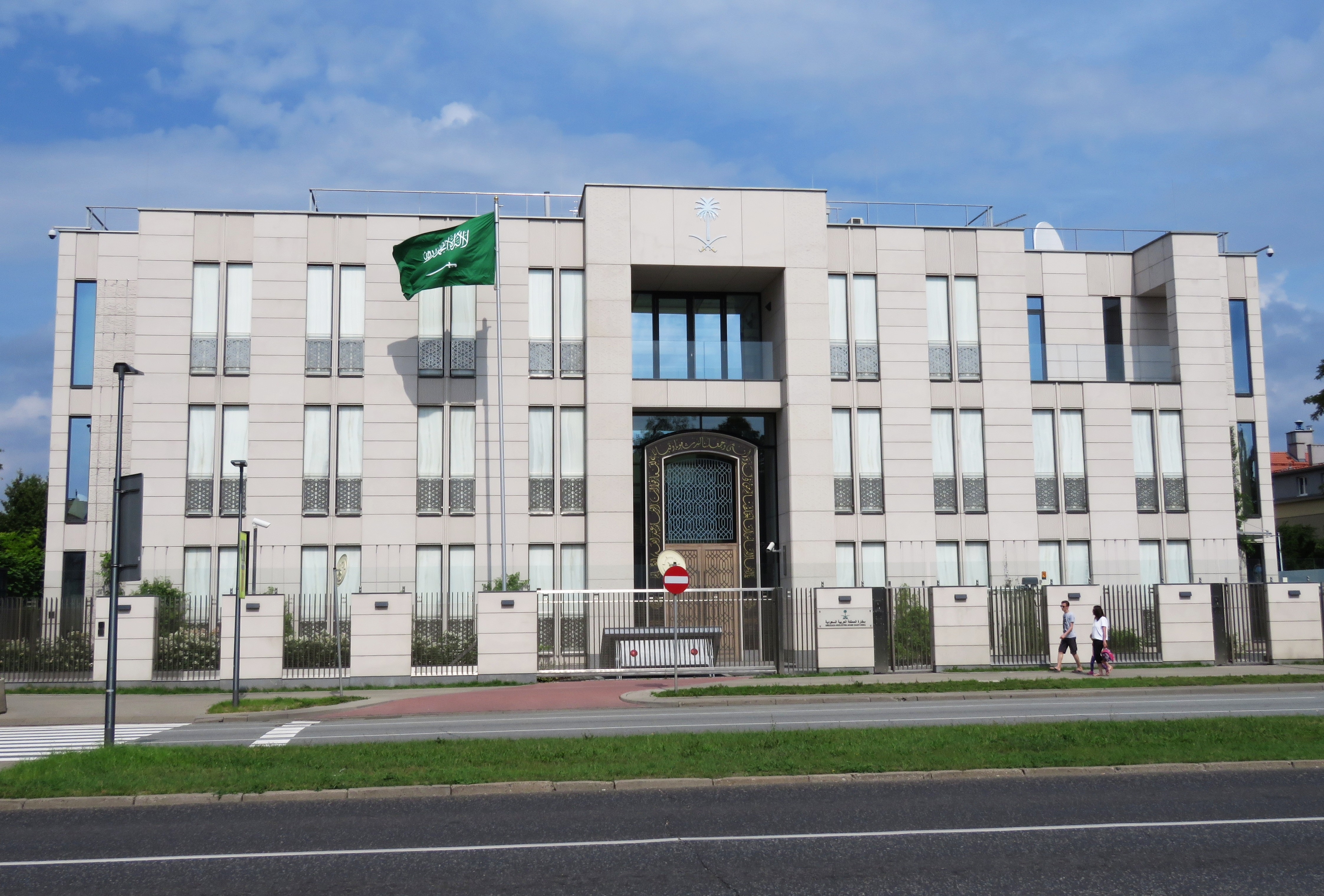 Ambasada Królestwa Arabii Saudyjskiej w Polsce